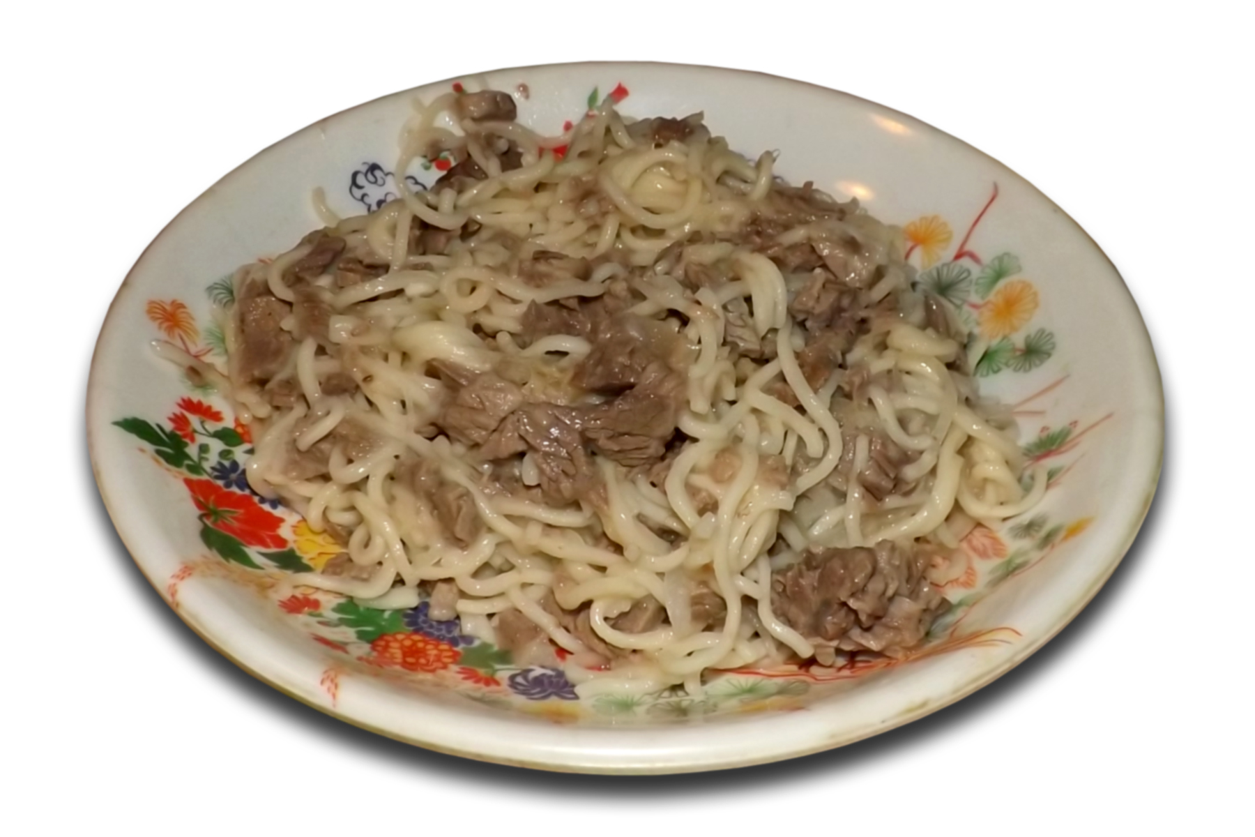 Бешбармак - блюдо из крошенного мяса с лапшой и луком